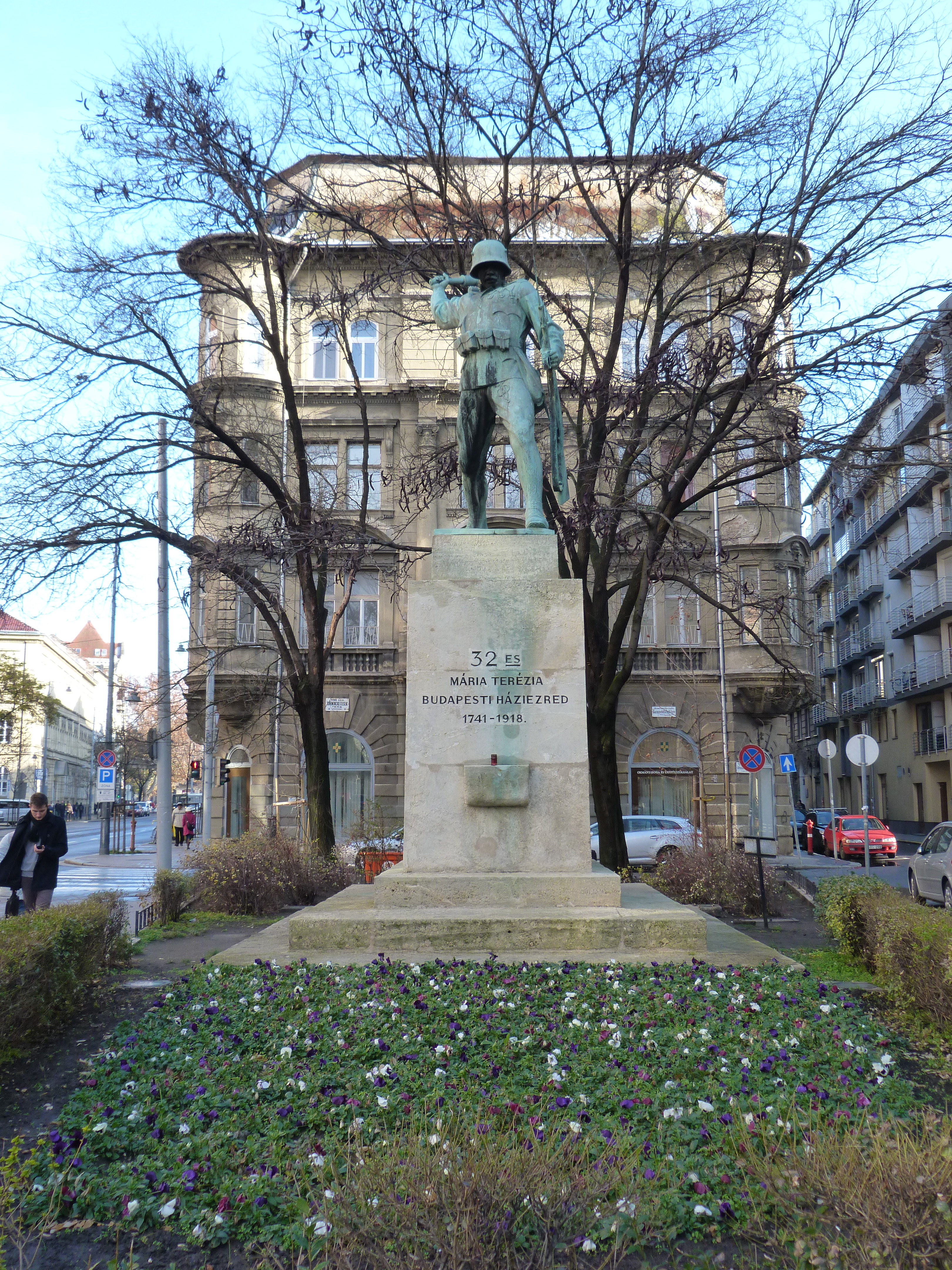 32 –es Mária Terézia Budapesti Háziezred 1741 – 1918 A fekvételek 2012. December 5- én készültek Budapesten, a 32 –esek terén. Vitam et Sanguinem ! Obernberg 1742, Hochkirk 1758, Belgrád 1789, Bassano 1796, Caldiero 1805, Aspern 1809, Leipzig 1813, Novara 1849, Solferino 1859, Skalitz 1866, Stolac 1878, Sabac 1914, Borowa 1914, Tatárszoros 1917, Montello 1918